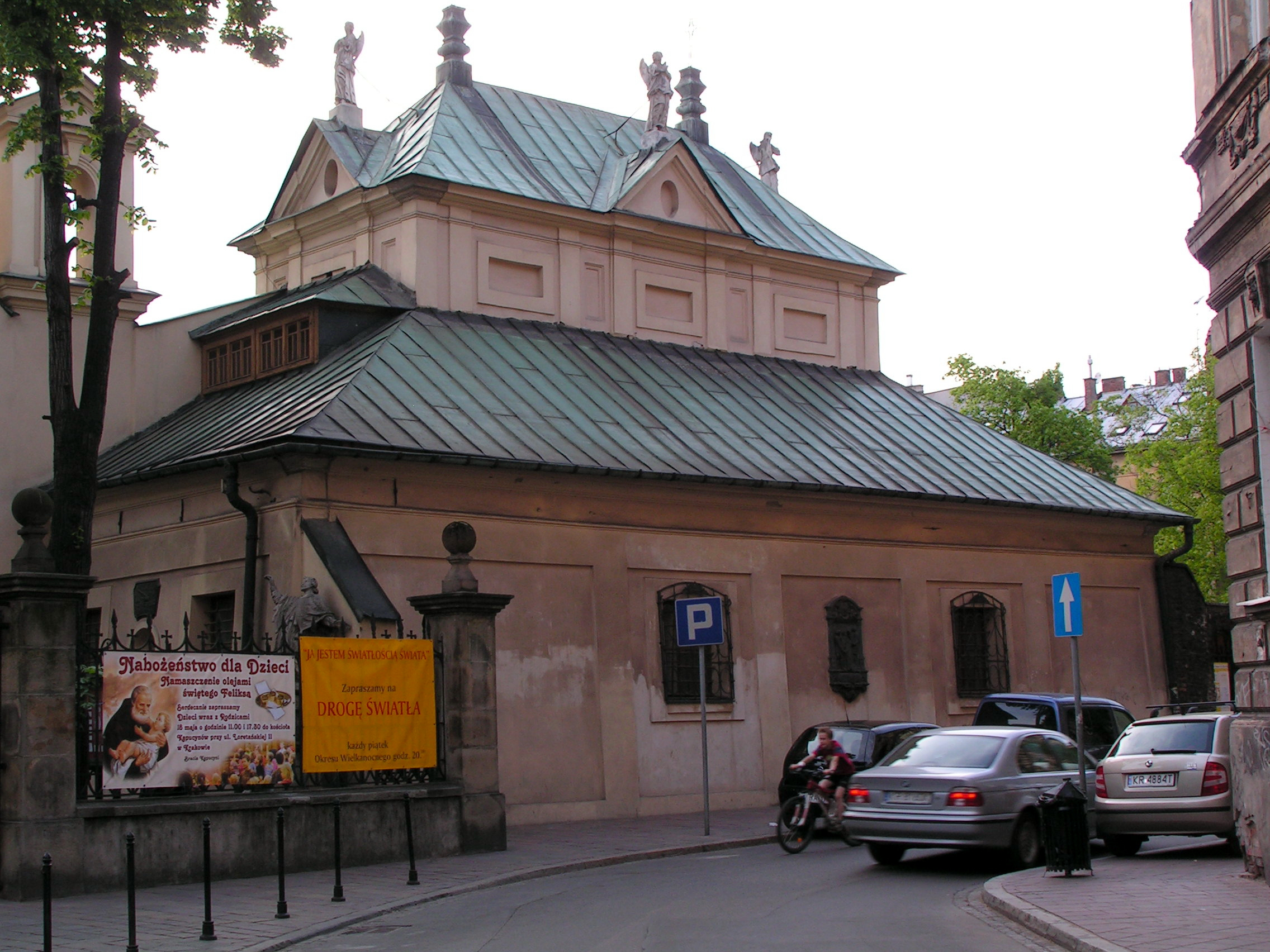 Domek loretański przy kościele Zwiastowania Najświętszej Maryi Panny w Krakowie (kapucynów) ul. Loretańska 11